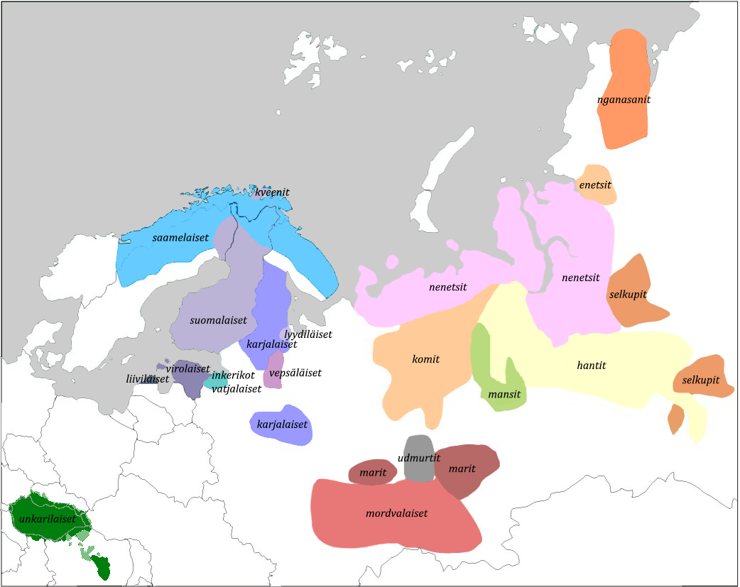 Uralilaisten kansojen asuinalueet